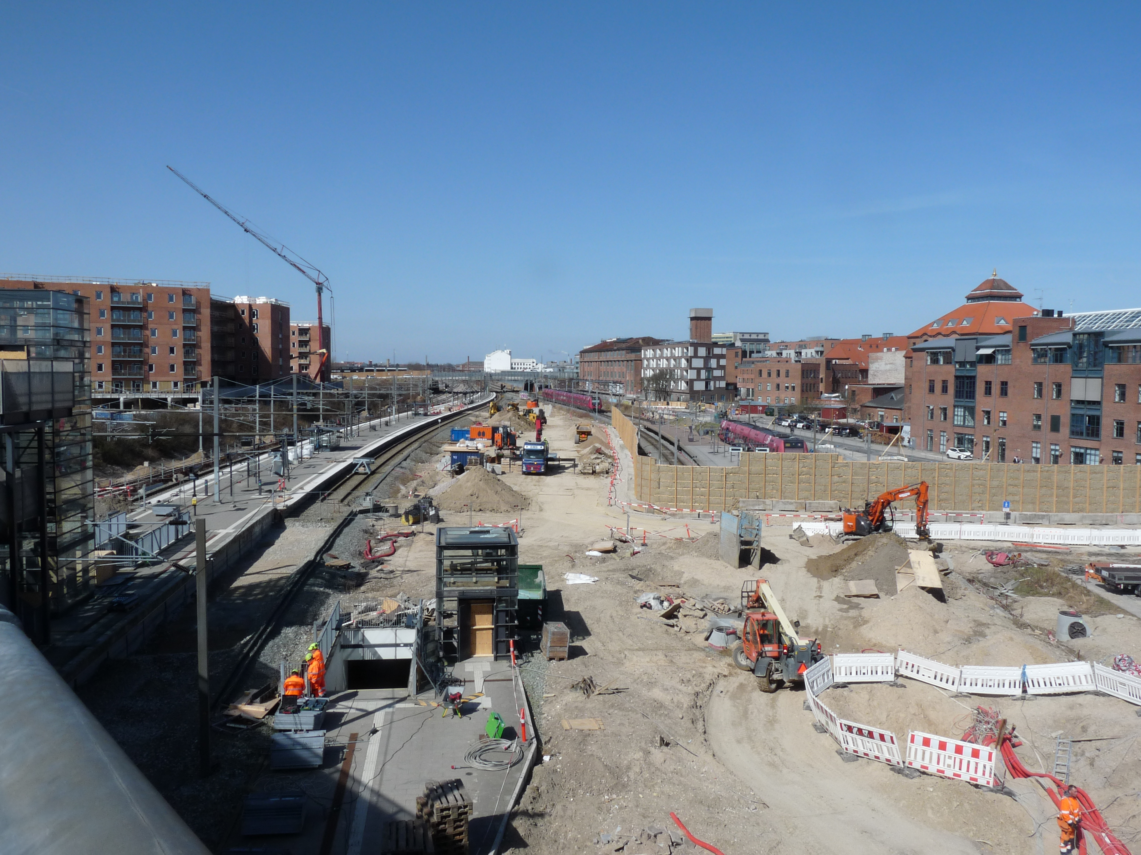 Ny Ellebjerg werkzaamheden